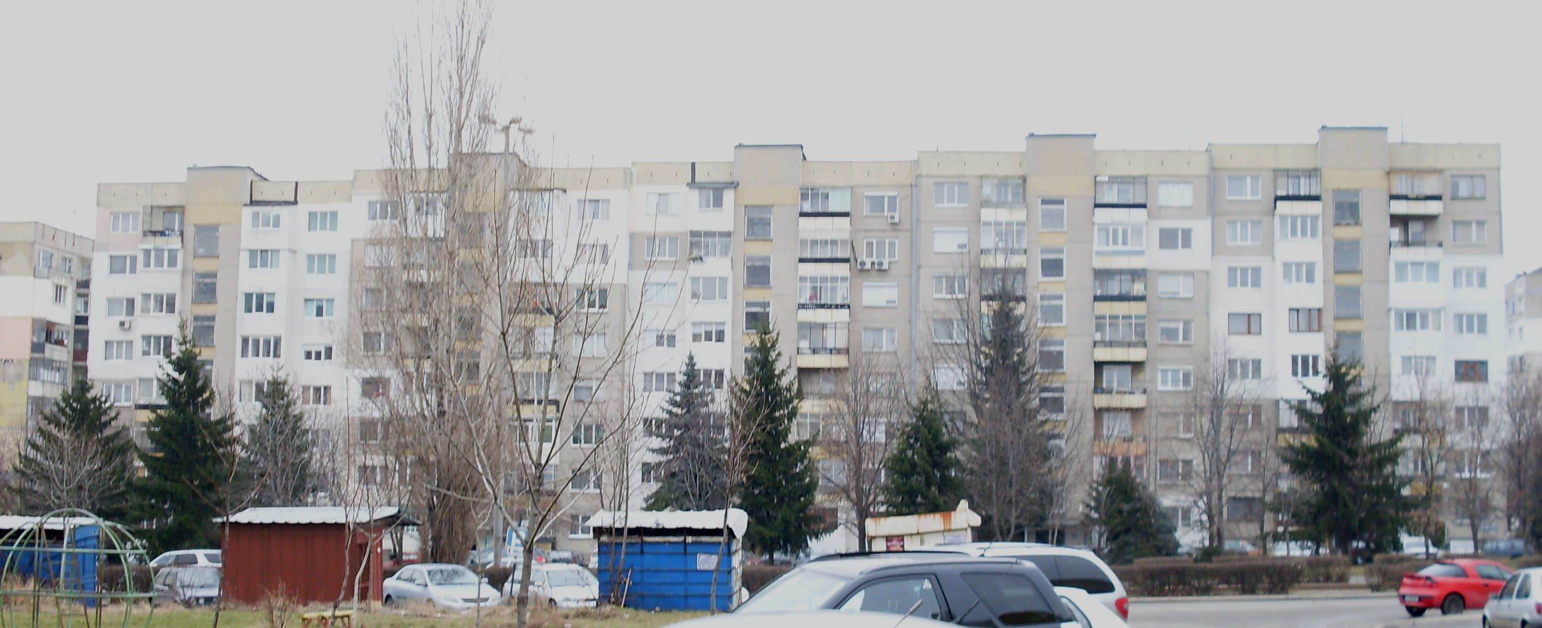 Жилищна сграда, изградена по номенклатура Бс 2-69 (или Бс-V-НипроИТИС-69). Виждат се характерните изнесени напред стълбищни клетки.